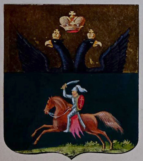 Беларуская (тарашкевіца): Невель (Nieviel). Герб места з Пагоняй (Pahonia)